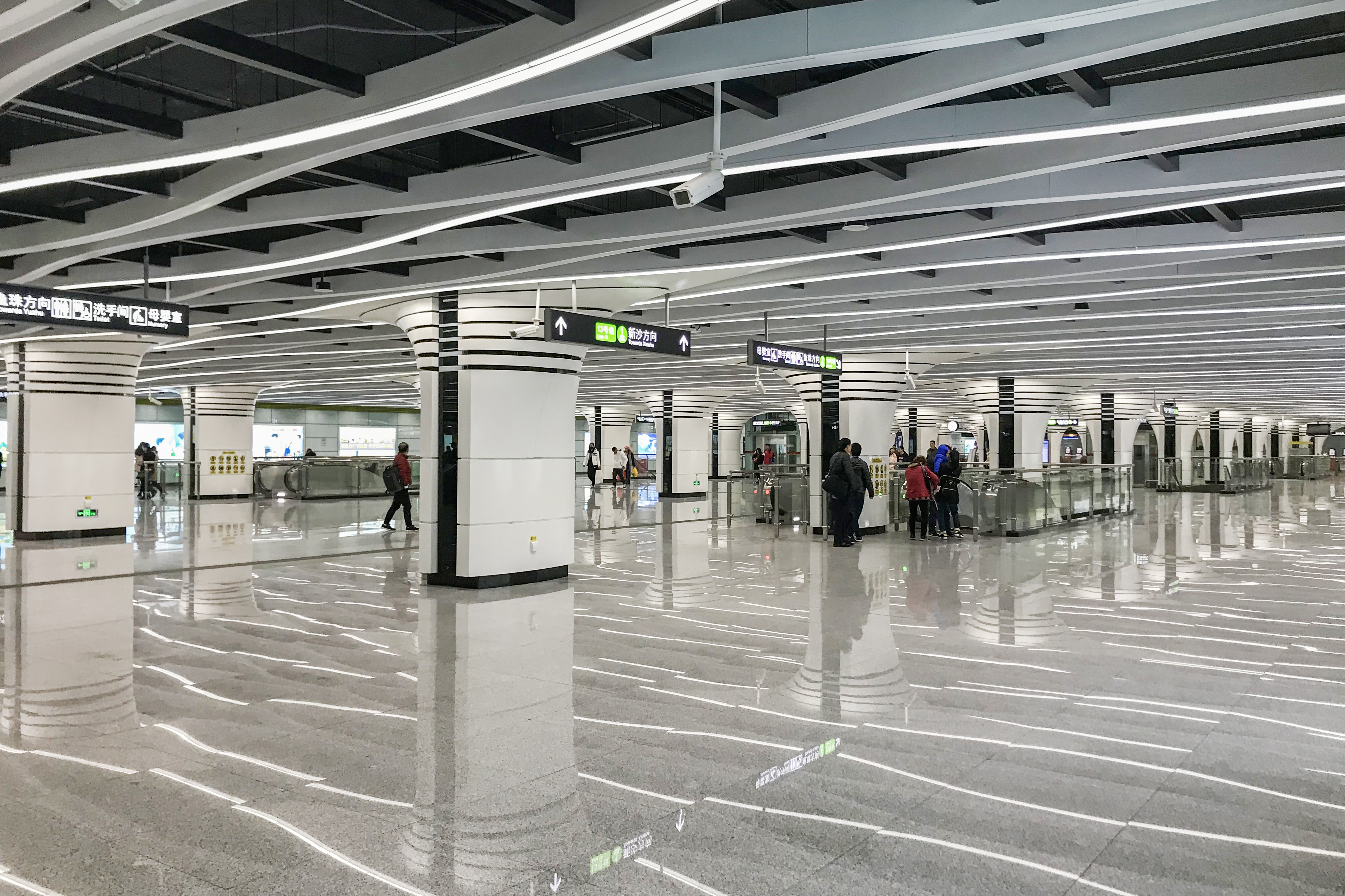 广州地铁新塘站